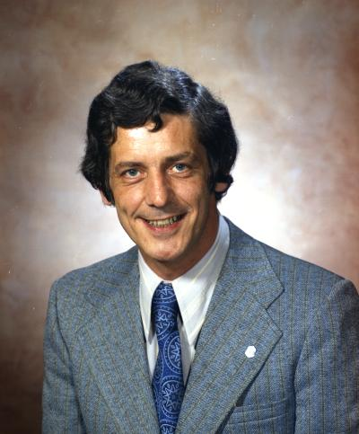 Representative A. J. "Bud" Pardini, 1973